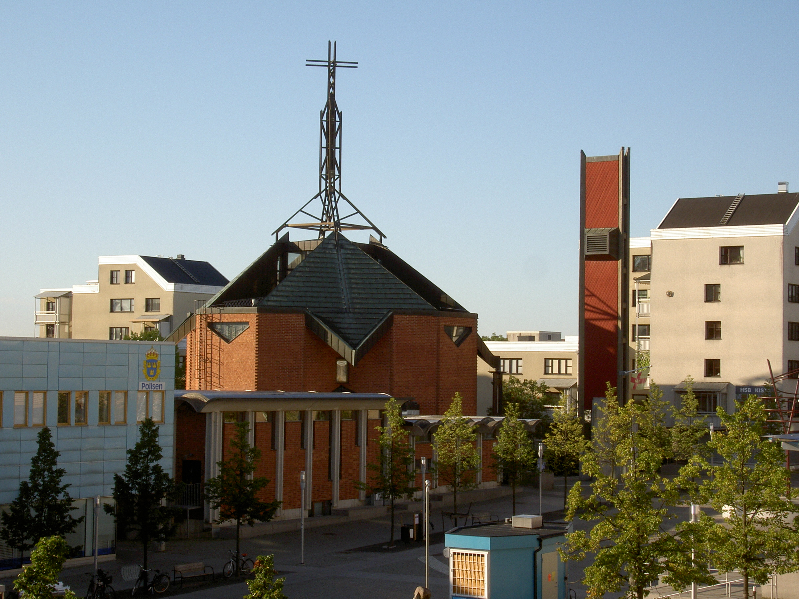 Kista kyrka